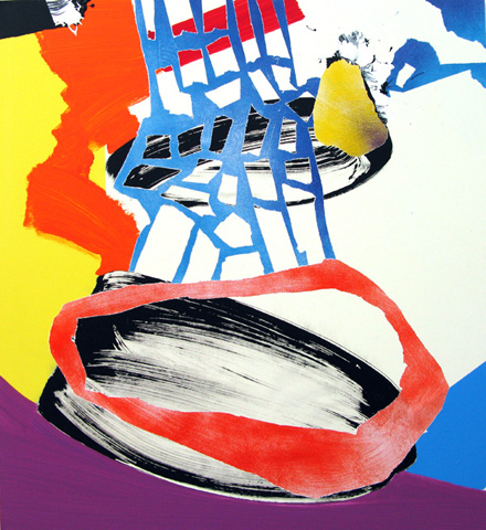 Acrílico y esmalte sobre tela. 110 x 100 cm.